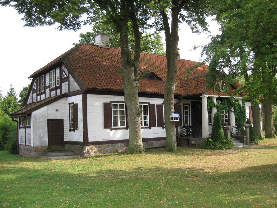 Dwór w Szteklinie